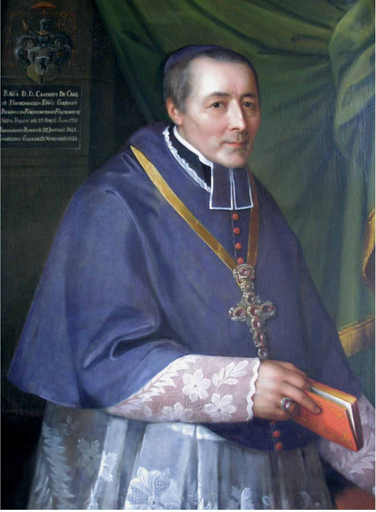 Kaspar de Karl ab Hohenbalken (1781-1859) Bischof von Chur 1844-1859. Porträt im Rittersaal des Bischöflichen Schlosses, Chur